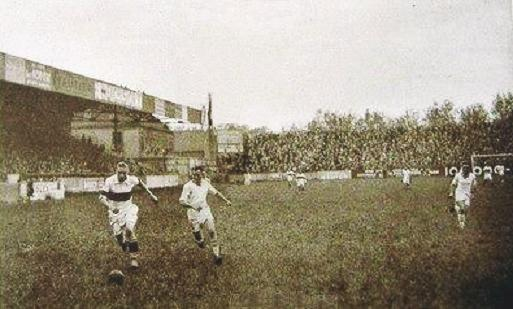 Photo du match opposant l'Olympique lillois à l'Olympique de Marseille en 1937 au stade Henri-Jooris. Victoire de Lille 2-1